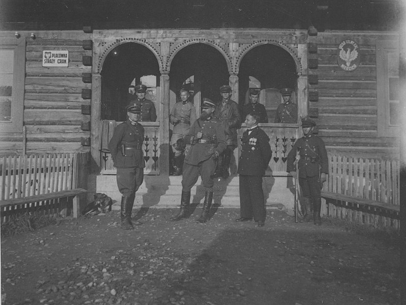 Posterunek Straży Granicznej w Niedzicy (granica z Czechosłowacją); funkcjonariusze straży pod budynkiem. Koncern Ilustrowany Kurier Codzienny - Archiwum Ilustracji. Sygnatura: 1-G-6403